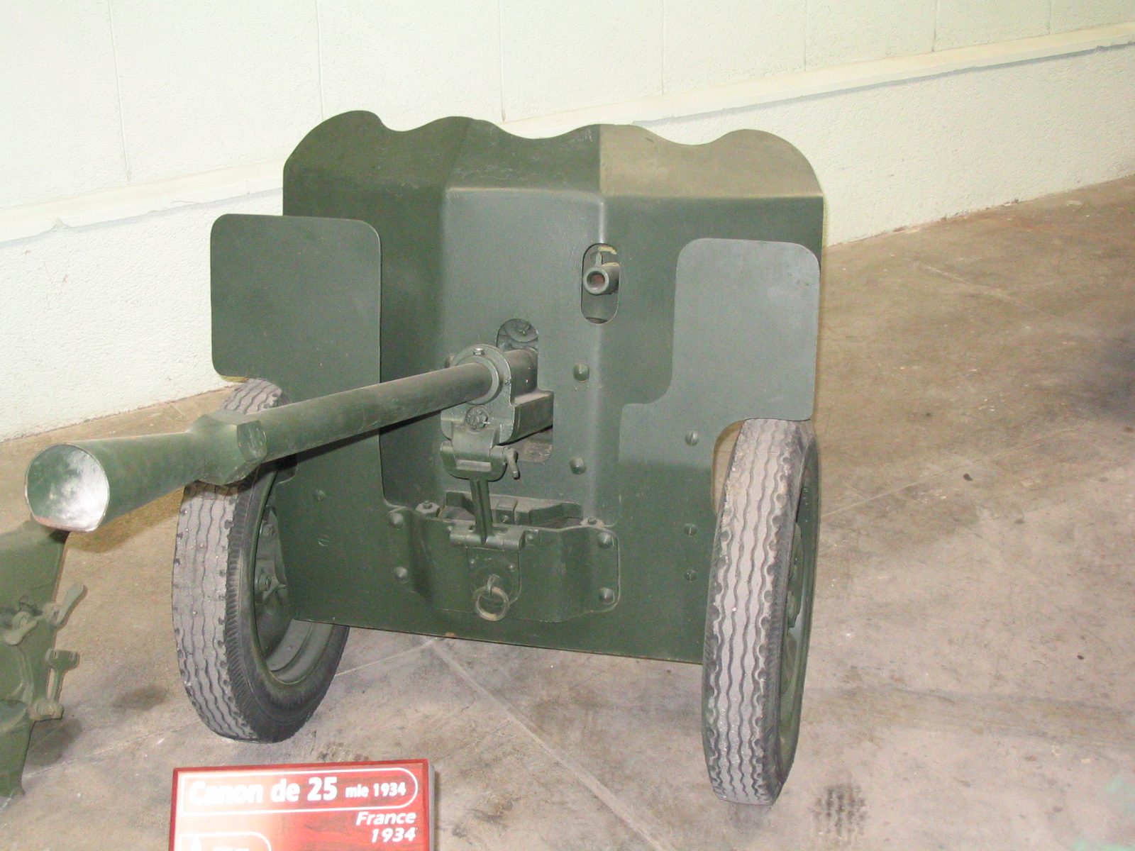 The 25 mm SA mle 1934 antitank gun at Saumur museum